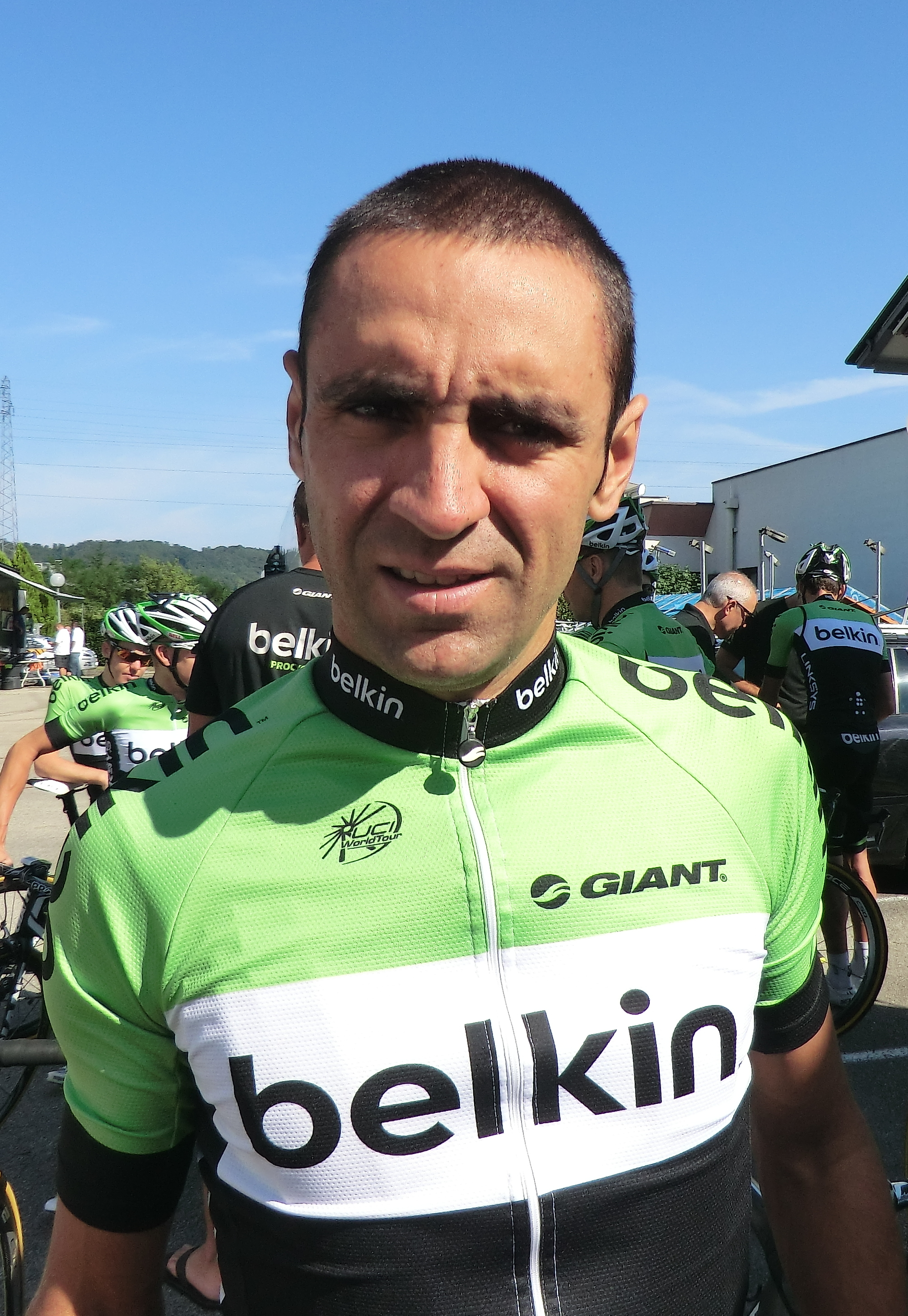 Coureurs à l'échauffement au matin du prologue du tour de l'Ain 2013, à l'hôtel Lyon-Est à Saint-Maurice-de-Beynost.